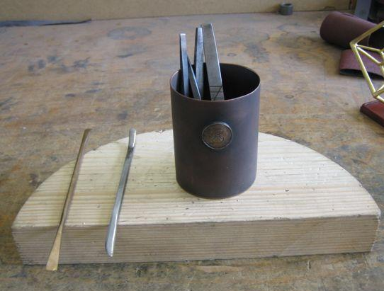 Kupferbüchse mit Tradititionell selbst geschmiedetem Ziseleurwerkzeug